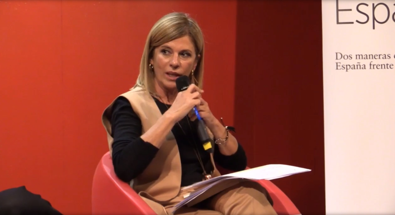 Pablo Iglesias y Enric Juliana presentan el libro 'Nudo España'.